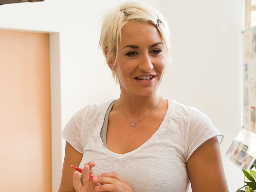 Sarah Connor während Typisierung DKMS bei Matthäusgemeinde Bremen